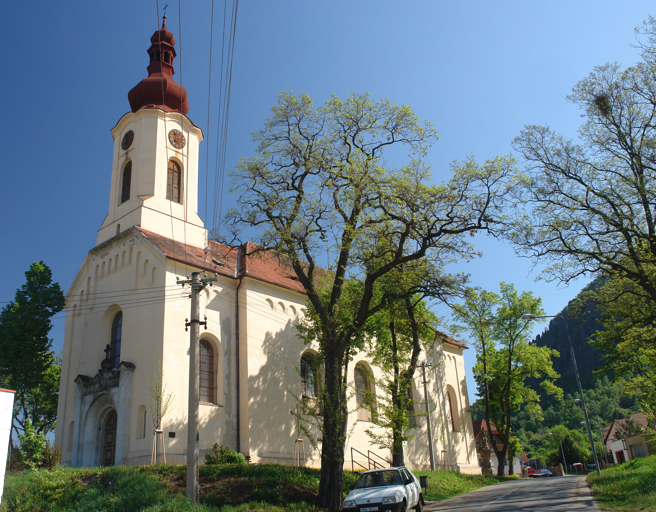 Kostel sv. Jiří (České Zlatníky), střed obce, České Zlatníky